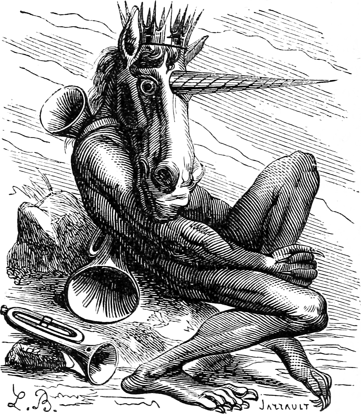 Une illustration pour l’article Amduscias dans le Dictionnaire infernal par Collin de Plancy.